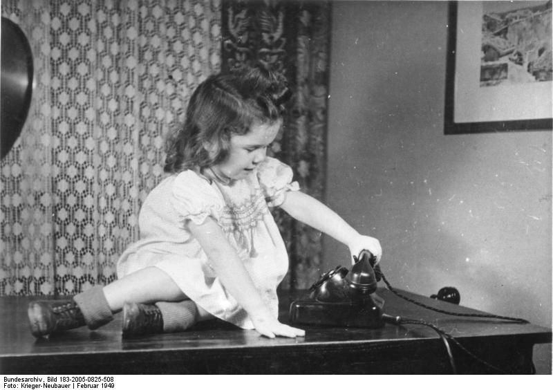 Kleines Mächen mit Telefon ADN-ZB/ Illus/Krieger-Neubauer Berlin, 21.2.1949 [Herausgabe] Kleines Mächen mit Telefon 2733-49